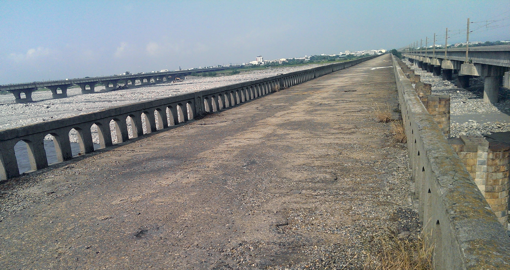 舊大安溪橋(鐵公路共構)公路橋面